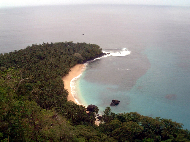 Praia Banana